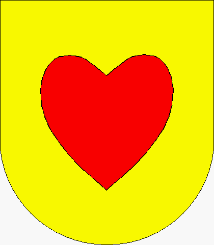 Znak obce Útvina